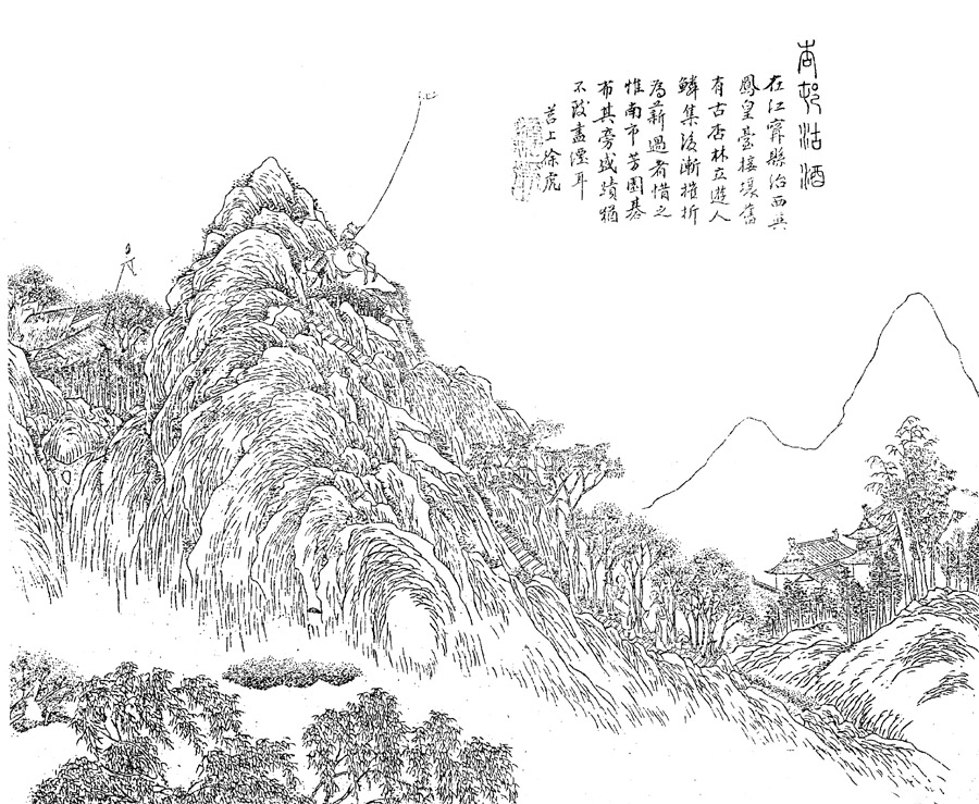 长干里客金陵四十八景图，封面标注了“长干里客金陵四十八景图……岁阴在赤奋若天中节蒲华馆主”，即1888年端午节。清光绪戊子申昌书局石印，款署端木瘦生及苕上徐虎，长干里客、端木瘦生均指清人徐虎。